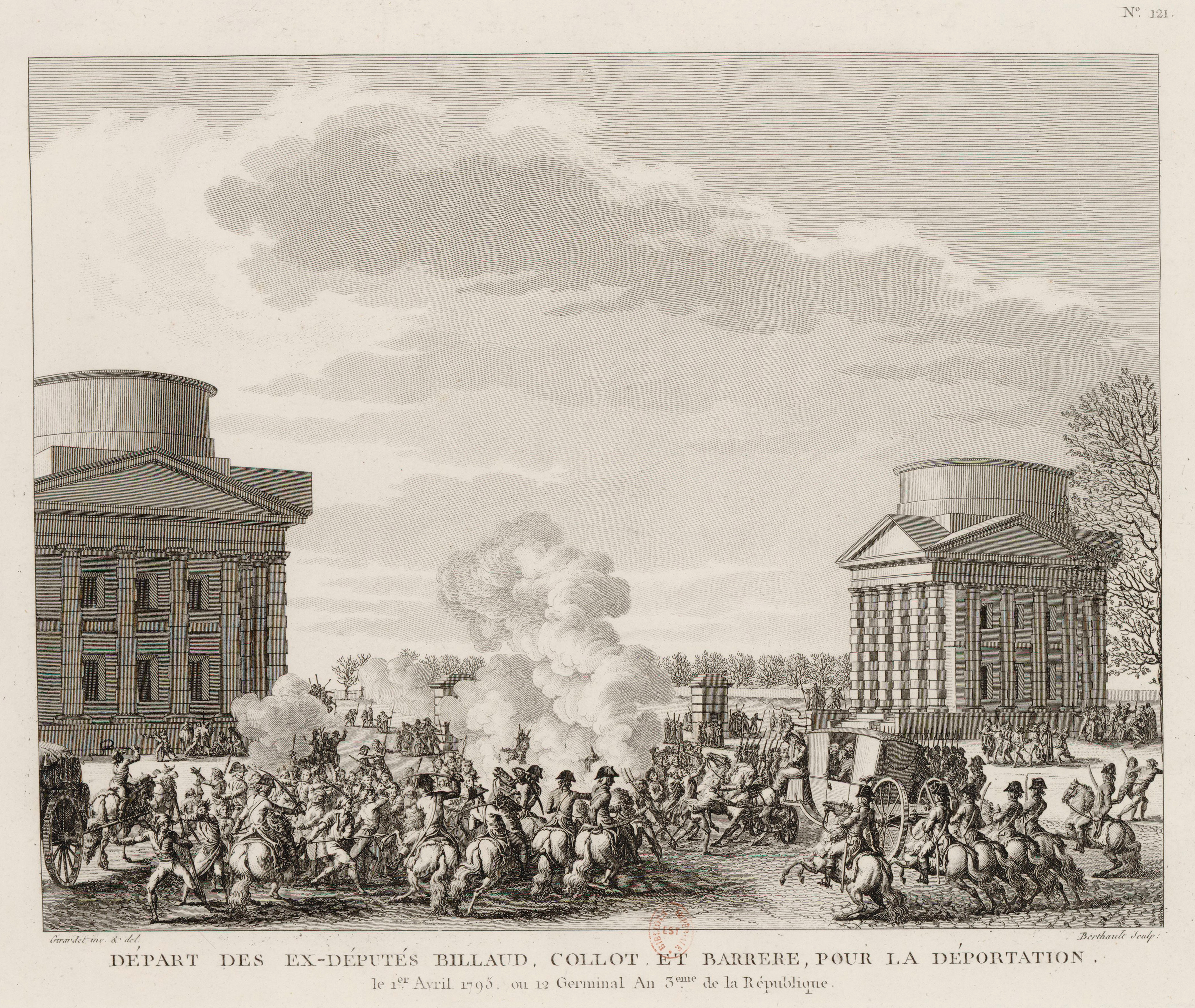 Départ des ex-députés Billaud, Collot et Barrere, pour la déportation : le 1.er Avril 1795, ou 12 Germinal An 3.eme de la République, tableau nº 121, extrait de la Collection complète des tableaux historiques de la Révolution française.